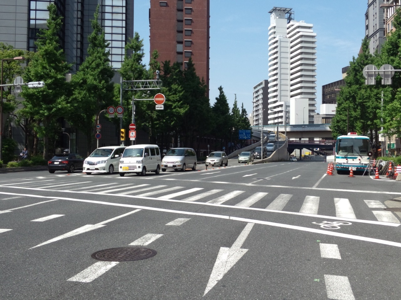 新御堂筋・梅新南交差点